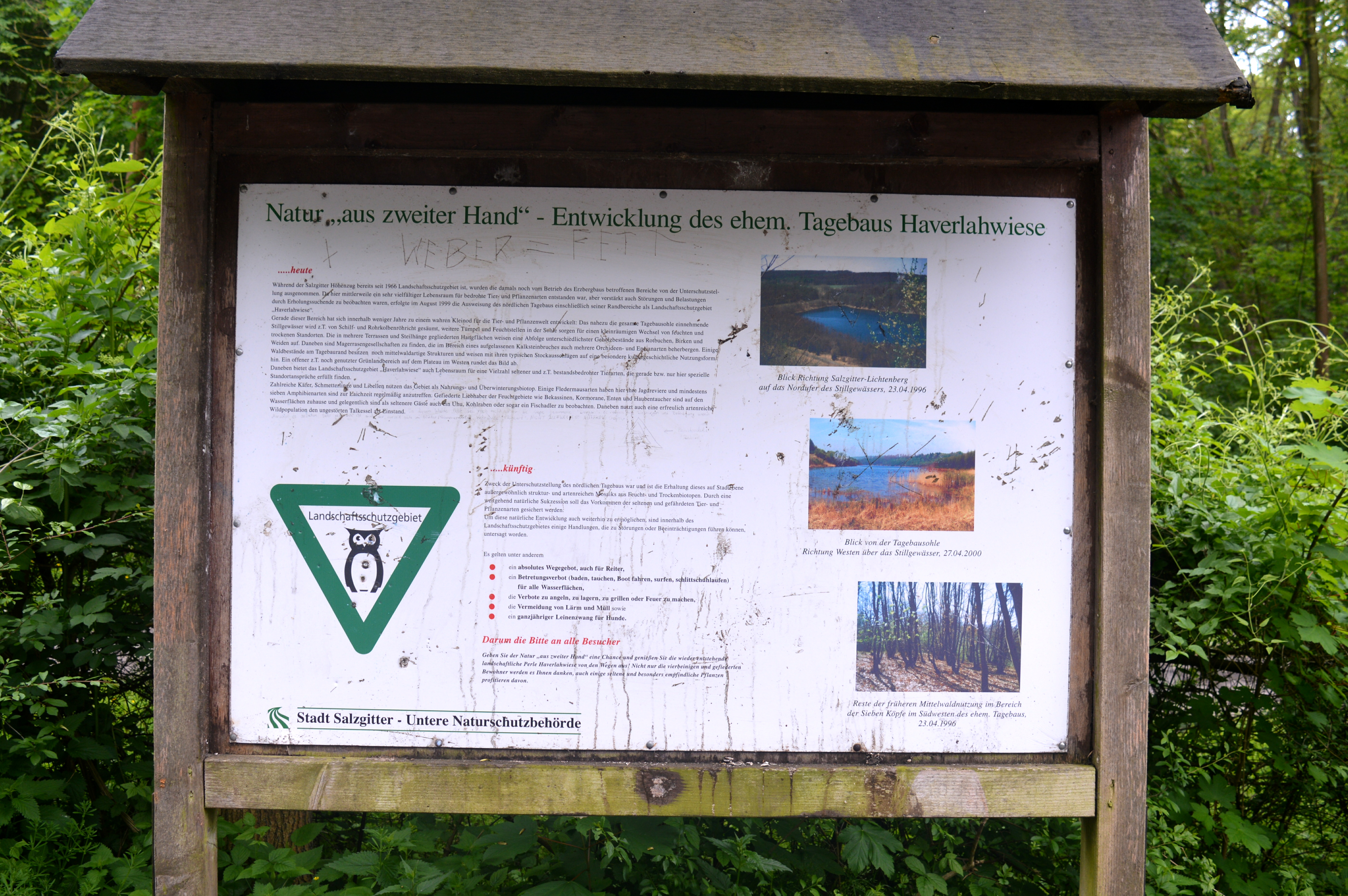 FFH Kammmolch-Biotop Tagebau Haverlahwiese - Infotafel „Natur aus zweiter Hand – Entwicklung des ehem. Tagebaus Haverlahwiese“